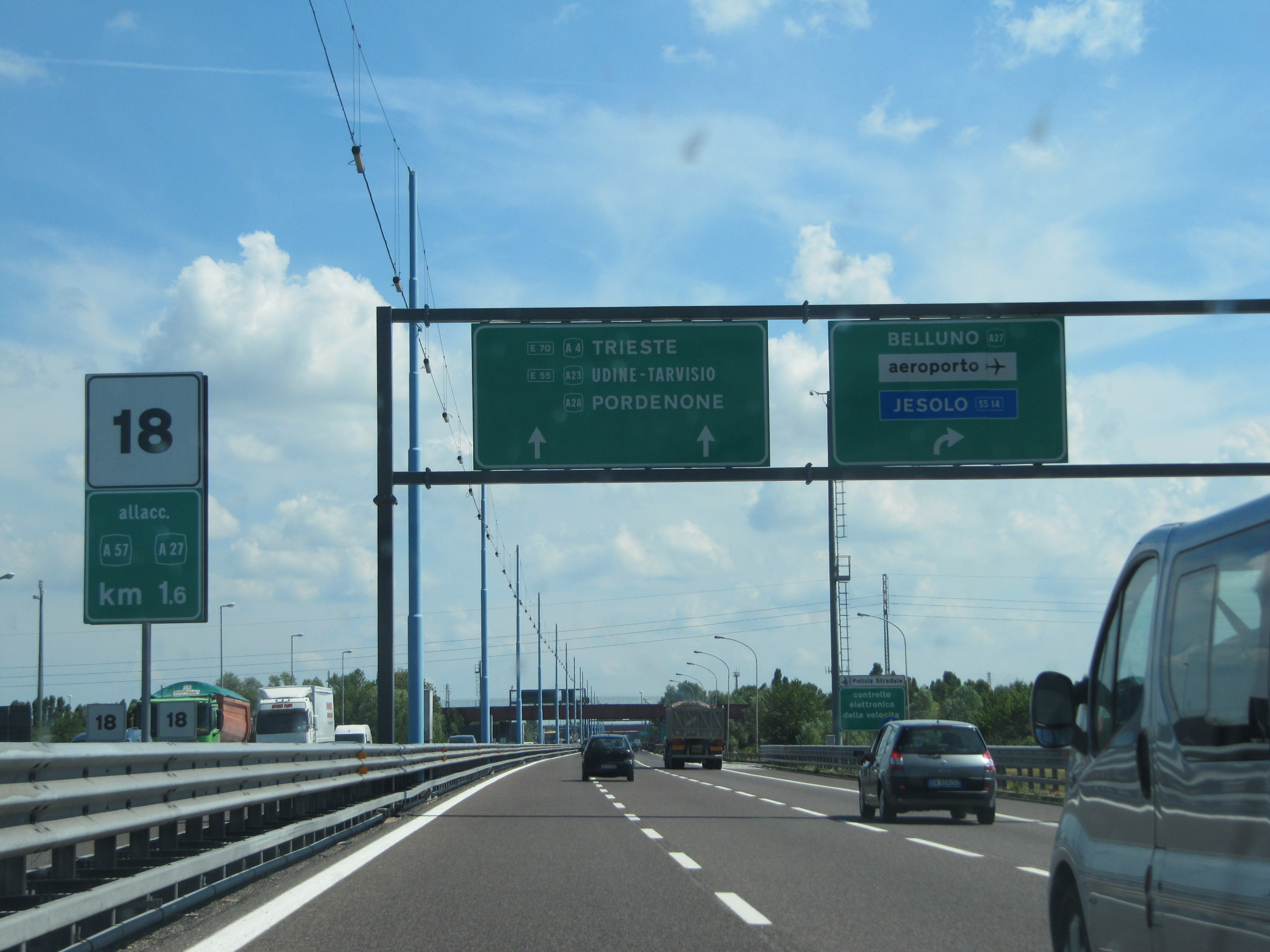 A57 Italia